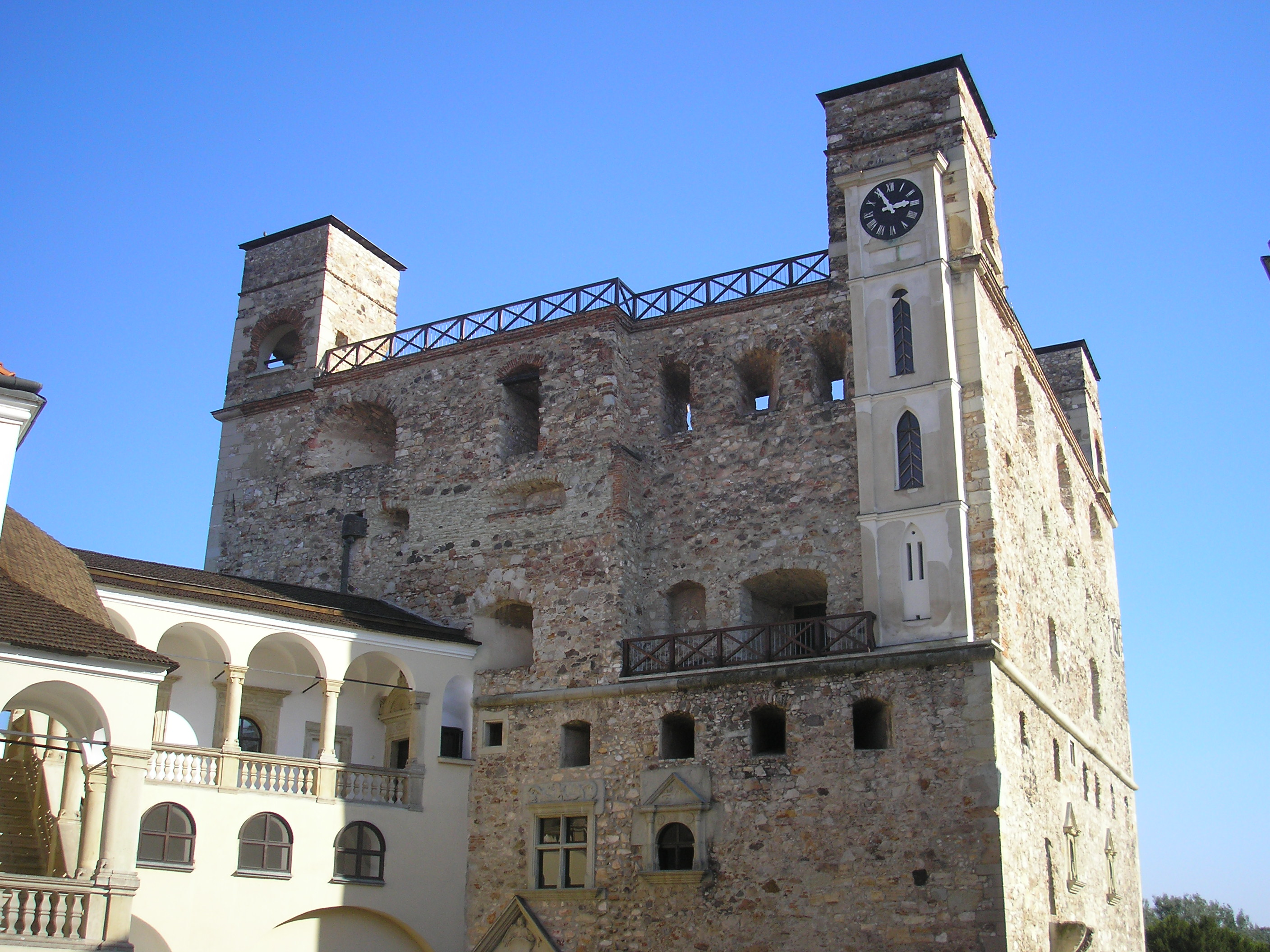 Sárospataki vár, Vörös-torony